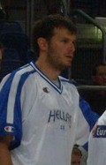 Antonis Fotsis im Juli 2008